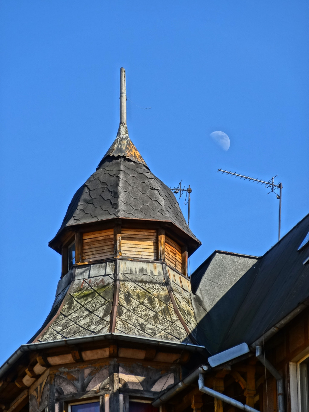 Kamienica ul. Cieszkowskiego 3 w Bydgoszczy (1903-1904, Paul Böhm)